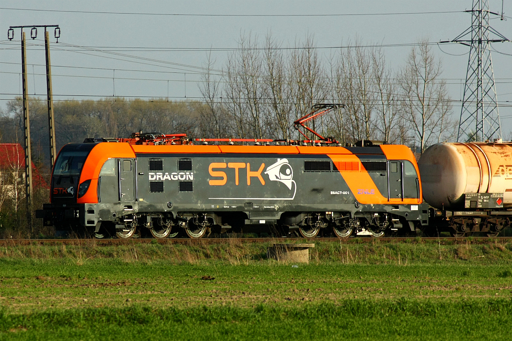 E6ACT-001; szlak Czempiń - Iłowiec